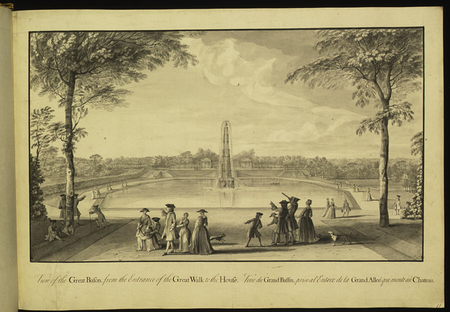 Pohled od Great Basin a vchodu cesty Great Walk k Stowe House, Buckinghamshire (asi 1739)